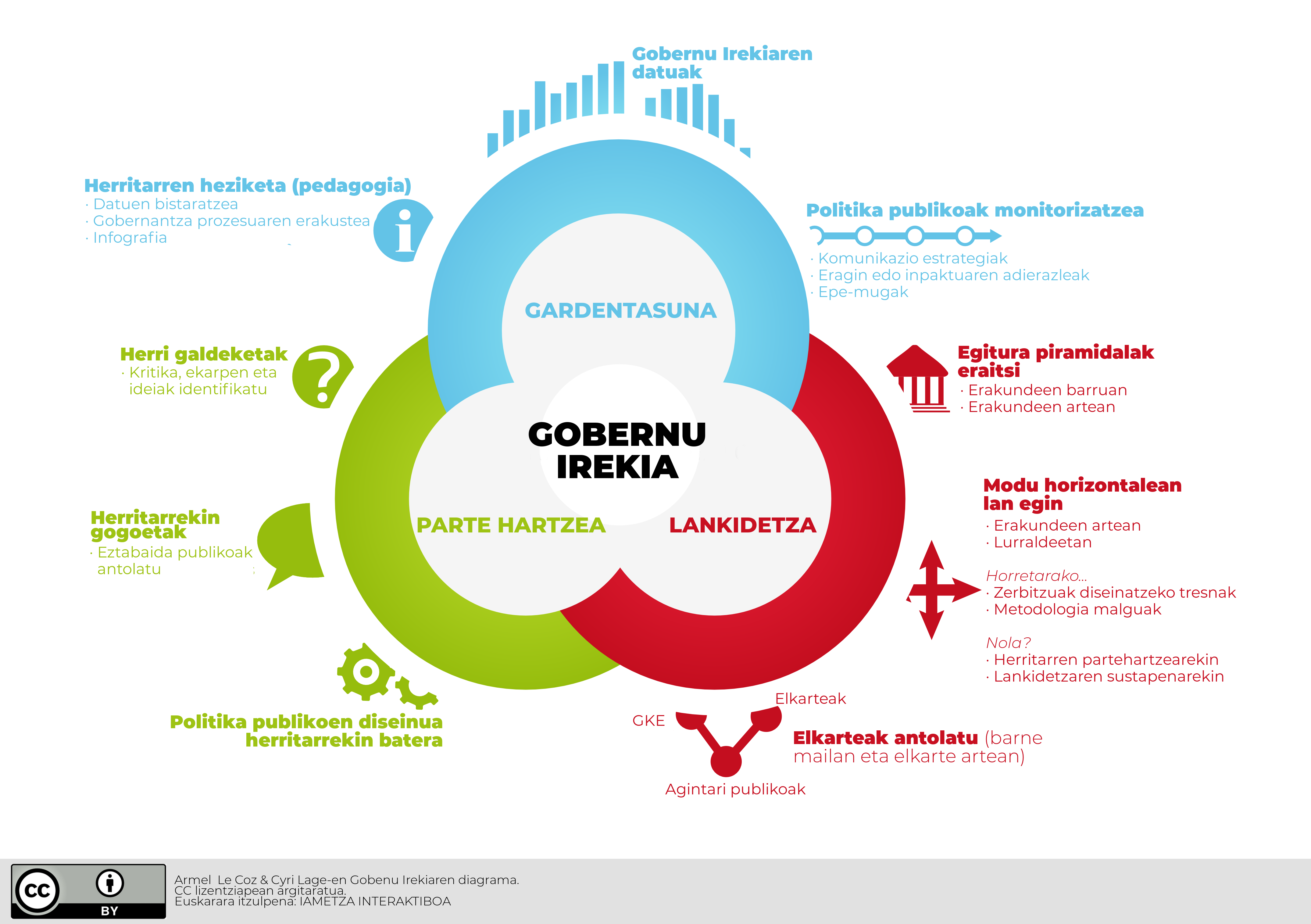 Armel Le Coz & Cyri Lage-en Gobenu Irekiaren diagrama. CC lizentziapean argitaratua. Euskarara itzulpena: IAMETZA INTERAKTIBOA